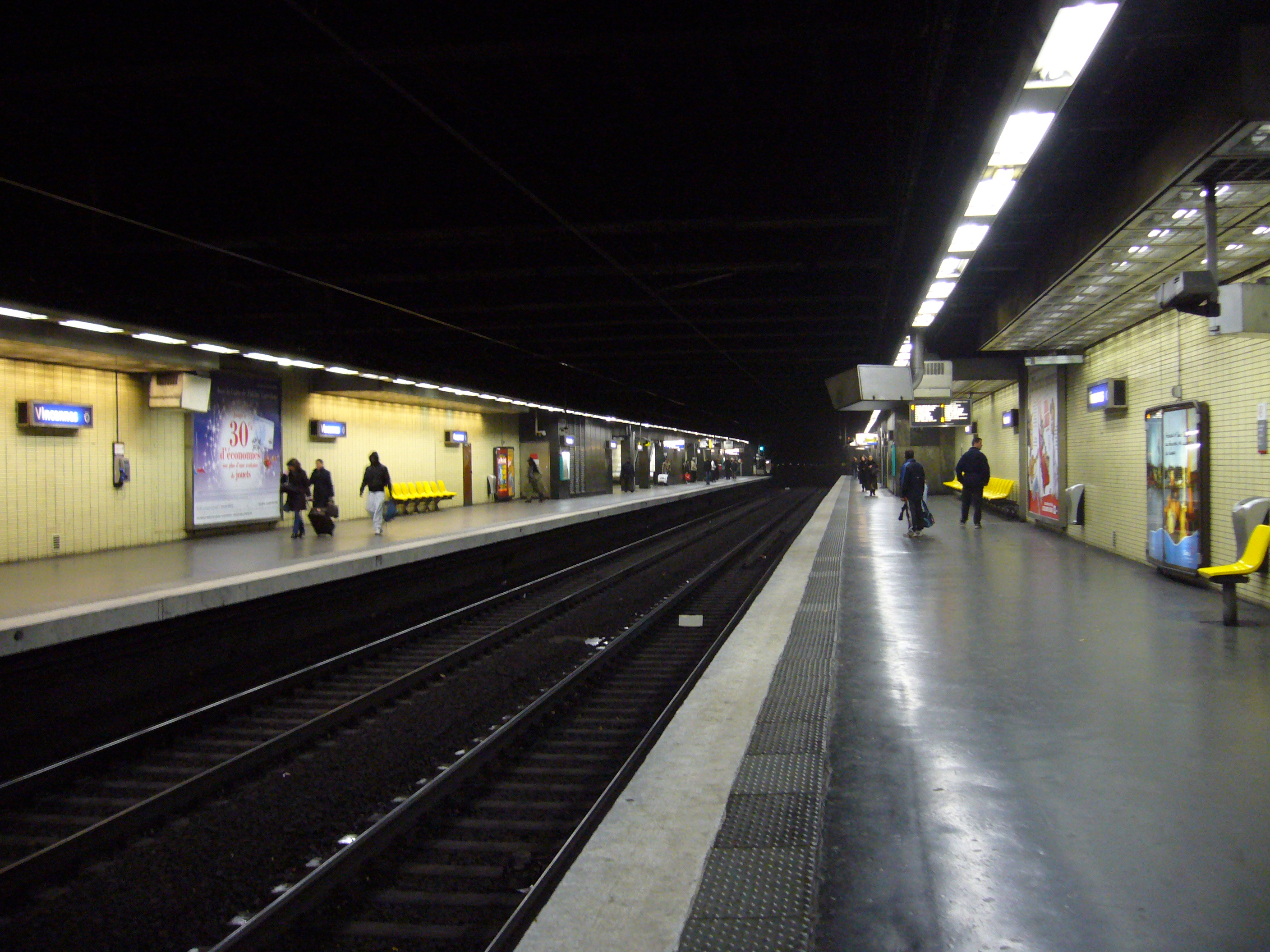 La gare de Vincennes sur la ligne A du RER d'Île-de-France.